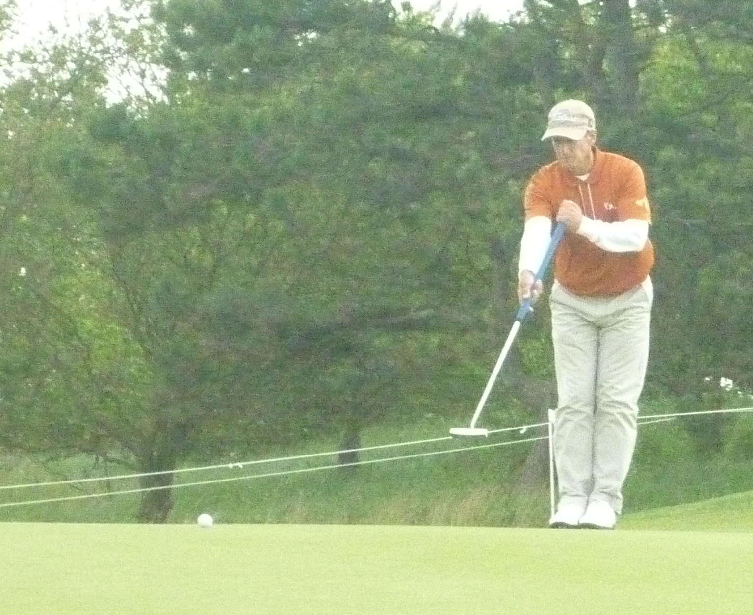 Norquist putting